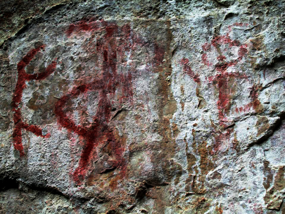 Pinturas rupestres de Ichic Tiog ( 3900 msnm) - Chacas - Ancash - Perú.